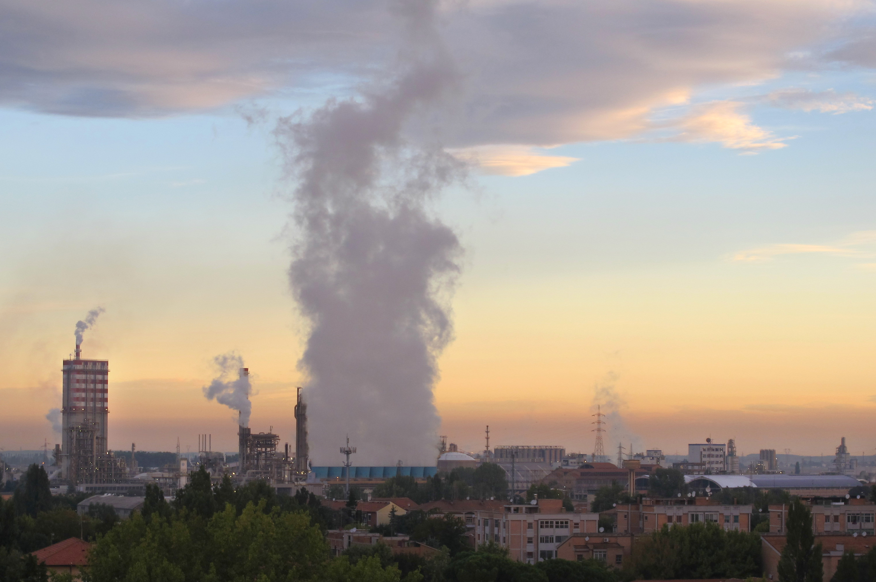 Ferrara